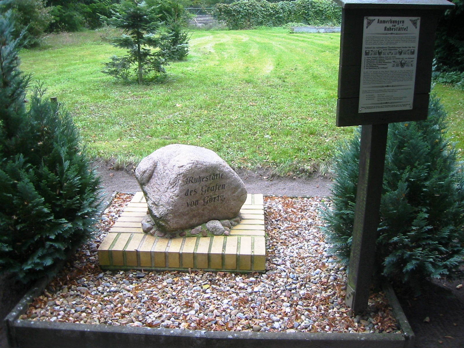 Findling über dem Grab von Görtz auf dem Kirchhof neben der Kirche in Münchehofe der gleichnamigen Gemeinde im Landkreis Dahme-Spreewald in Brandenburg